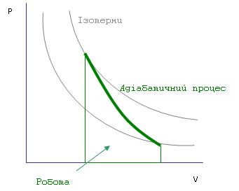 Адіабатичний процес